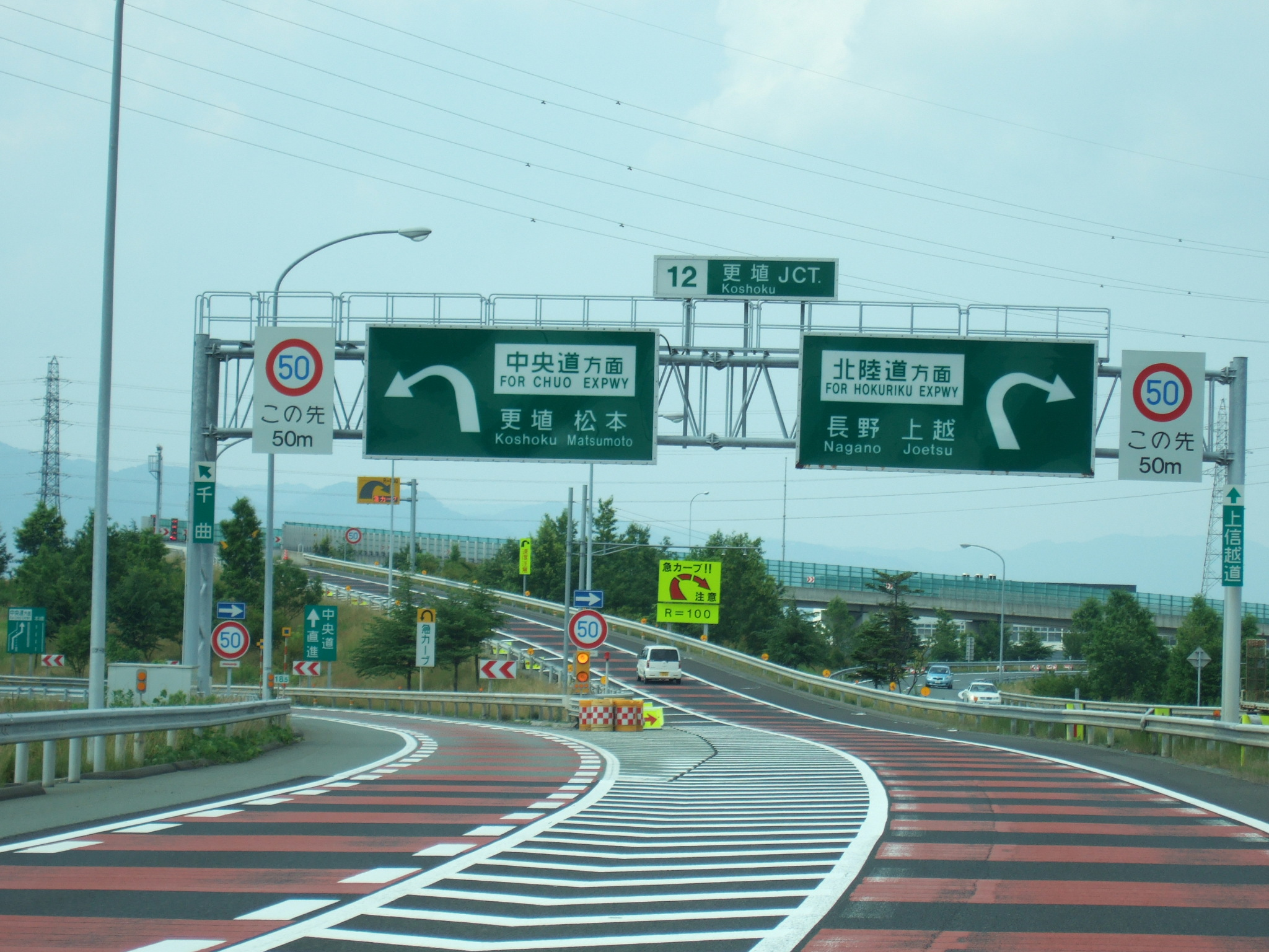 更埴JCTの標識